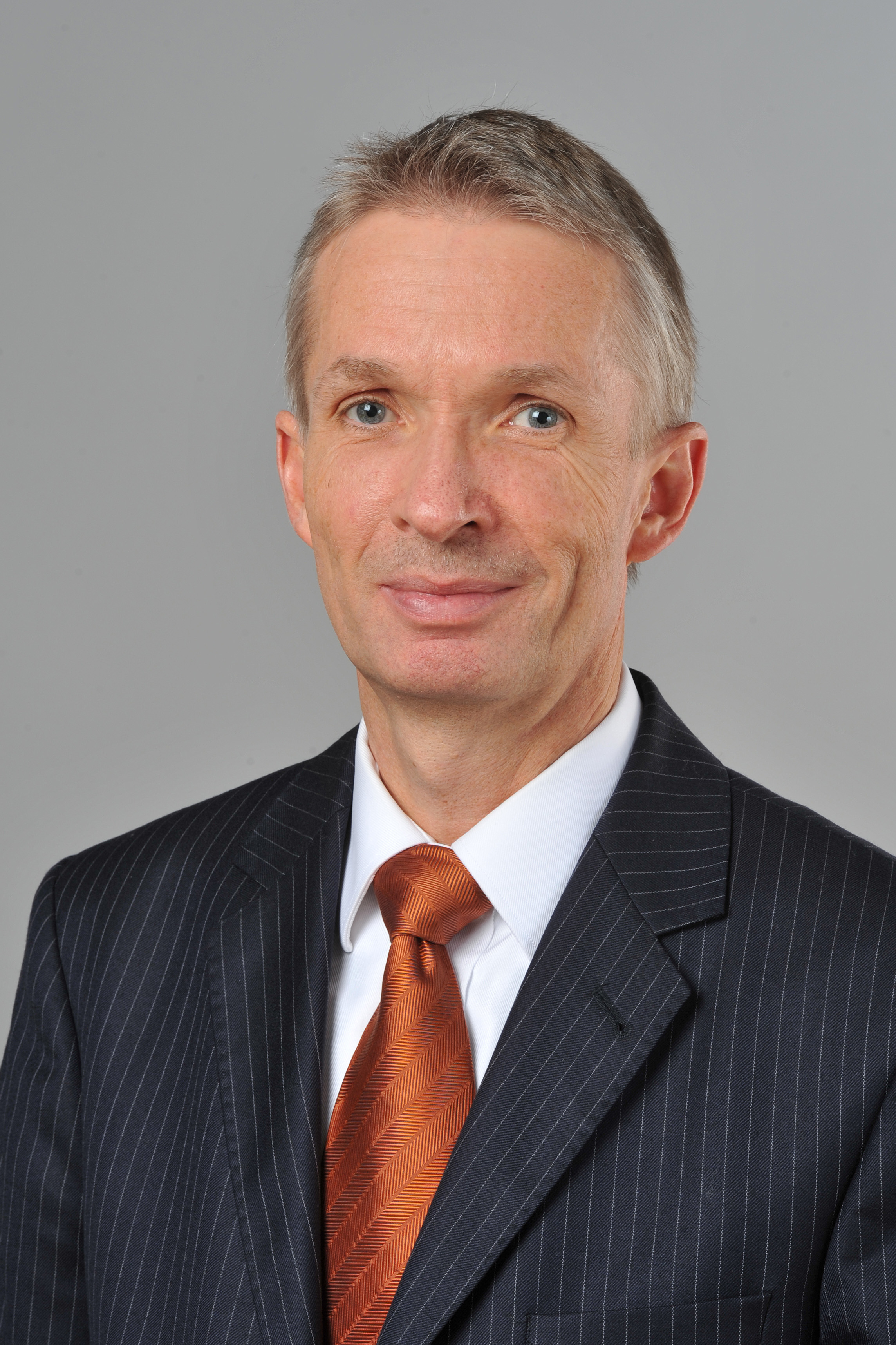 Landtagsprojekt Nordrhein-Westfalen 27. - 29. November 2013 Gerhard Papke